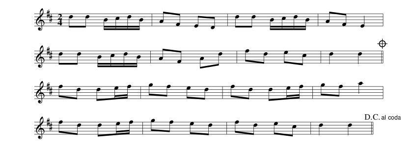 Arquivo .png que contém trecho da canção "Ryan's", uma canção tradicional irlandesa, demonstrando o uso da indicação Da Capo, e da indicação "Da Capo al Coda".